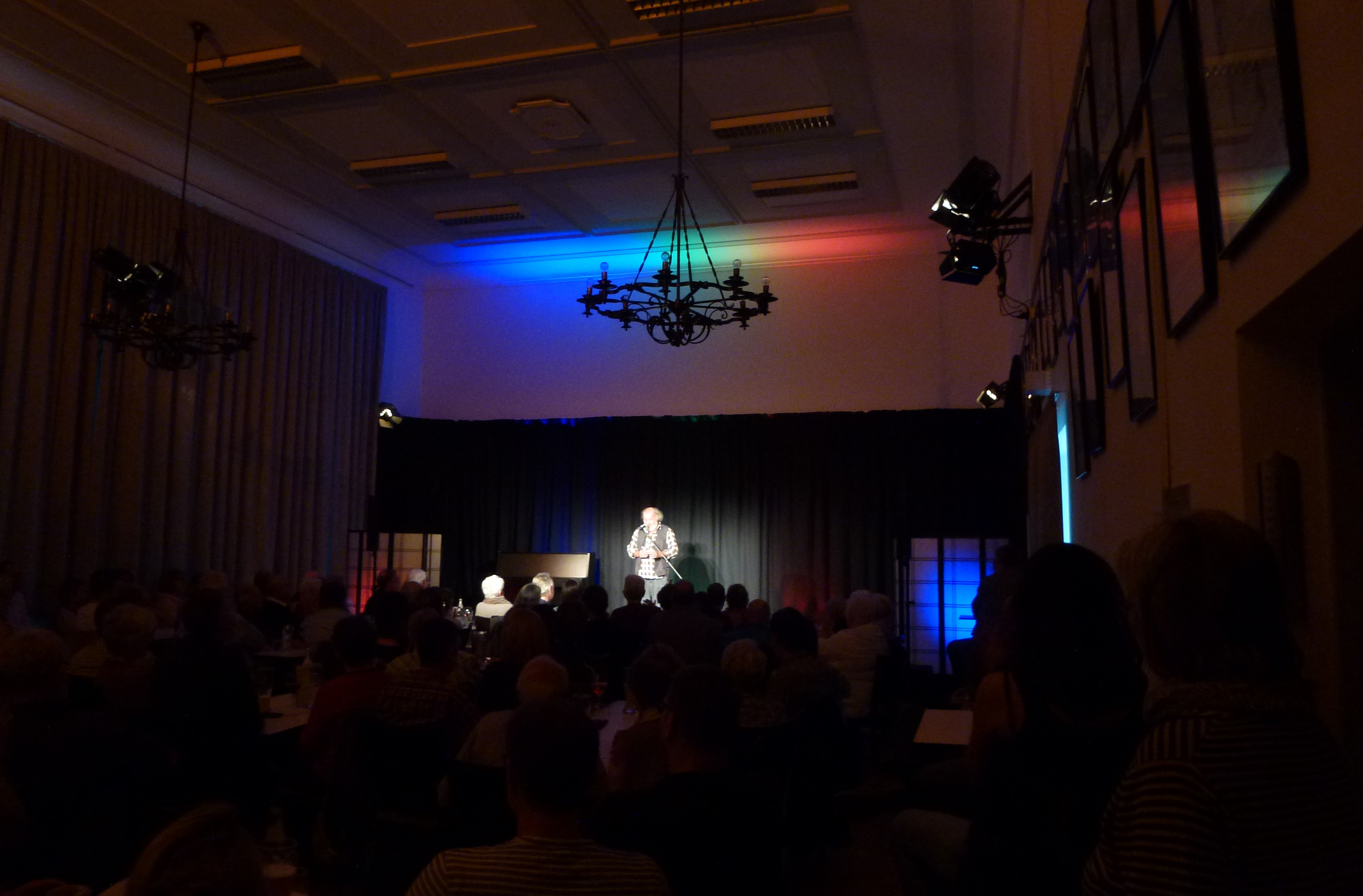 Otmar Trabers Bühne Casino Kornwestheim